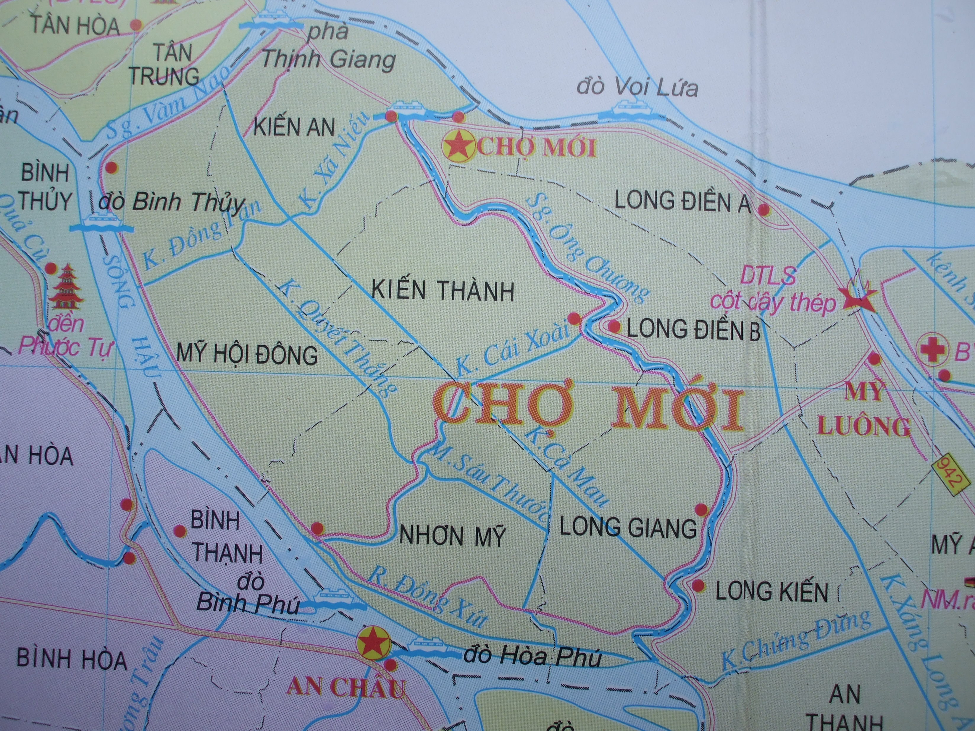 Bản đồ rạch Ông Chưởng, thuộc Chợ Mới, An Giang, Việt Nam